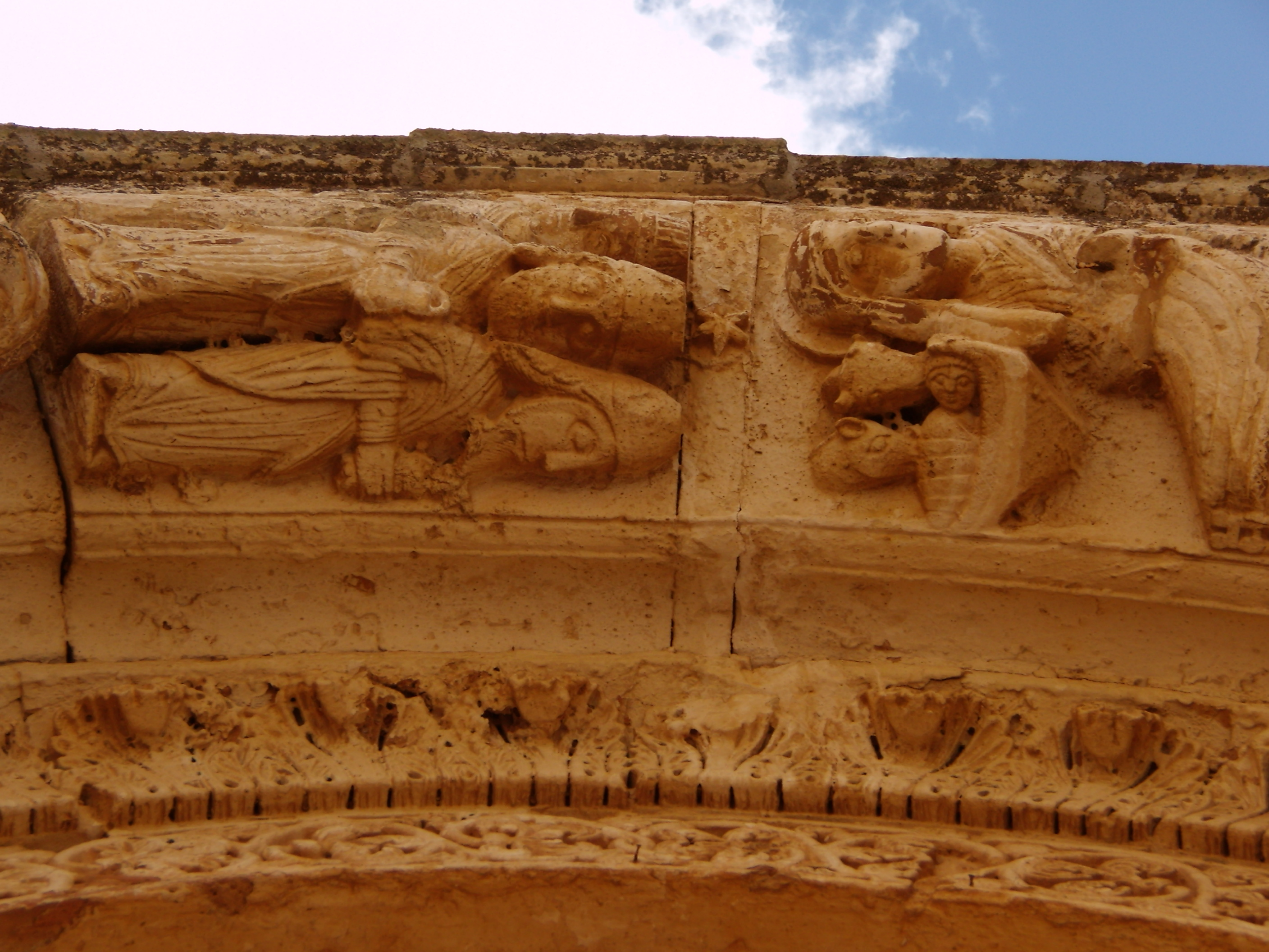 Abbazia di Santa Maria a Cerrate - duecentesco portale con rilievi dell'Annunciazione della Vergine e dei Magi